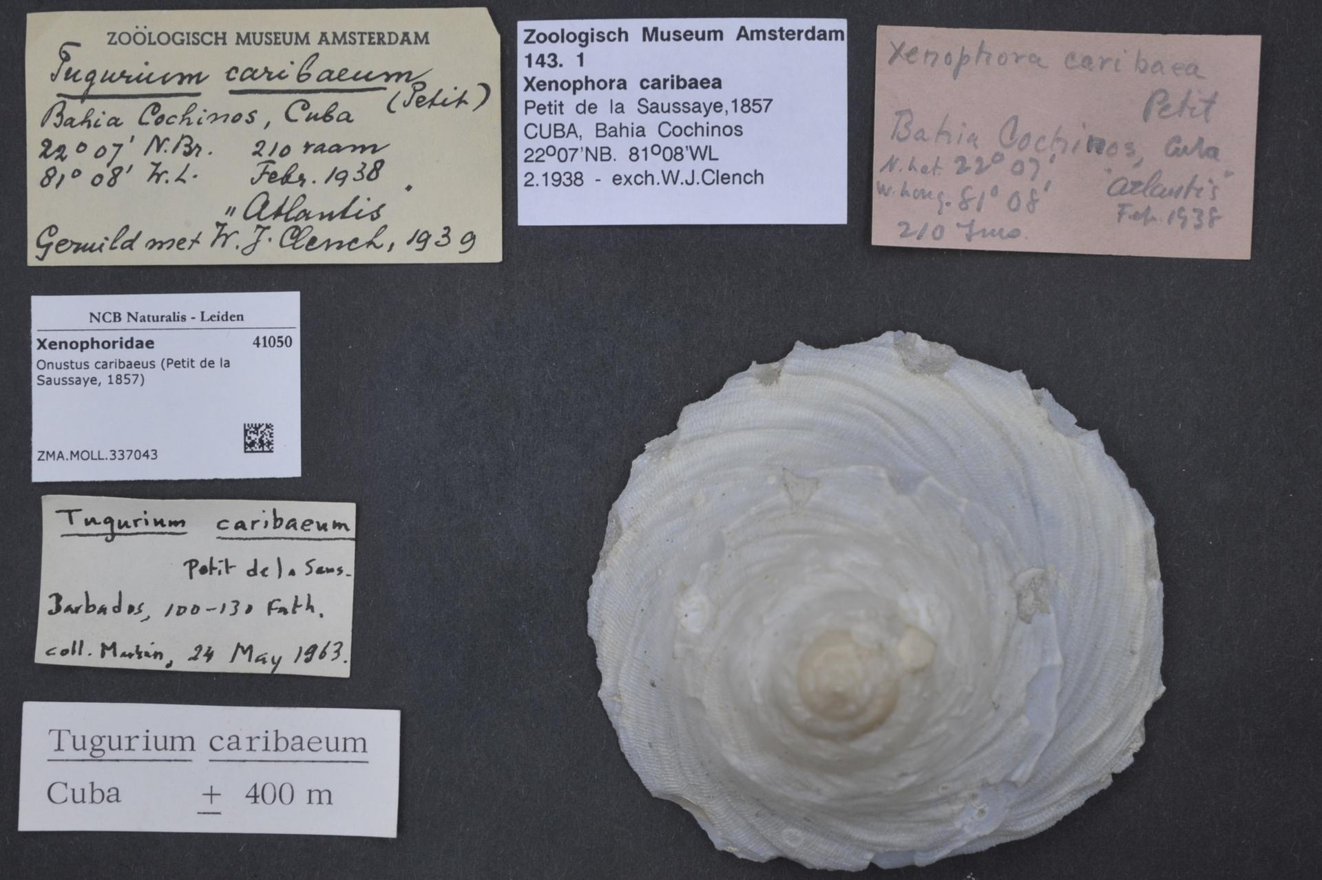 Onustus caribaeus (Petit de la Saussaye, 1857)